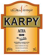 Etiqueta de licor de naranjas Karpy de destilerías Manuel Acha.